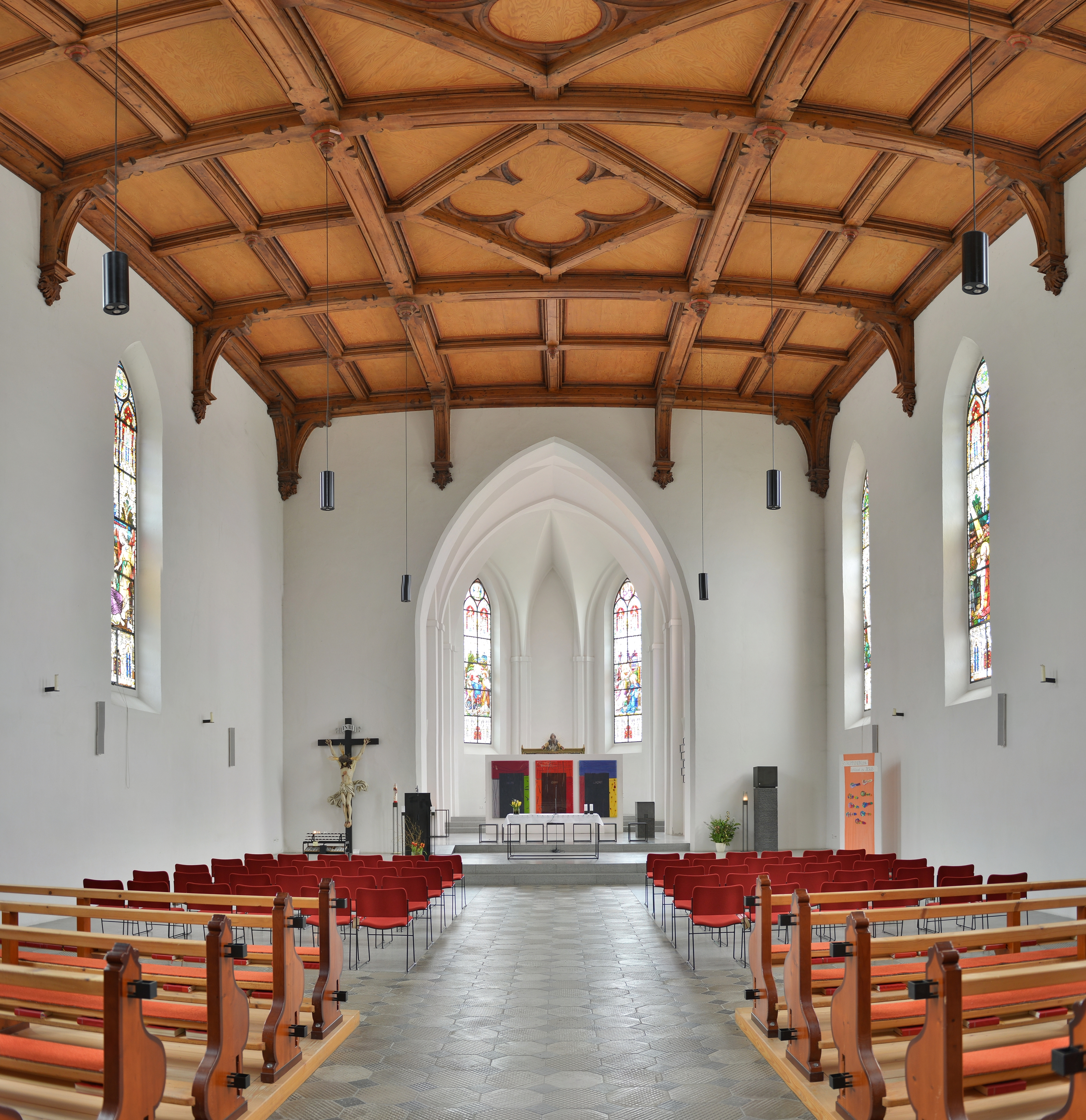 Pfarrkirche hl. Josef in Kennelbach, Vorarlberg.